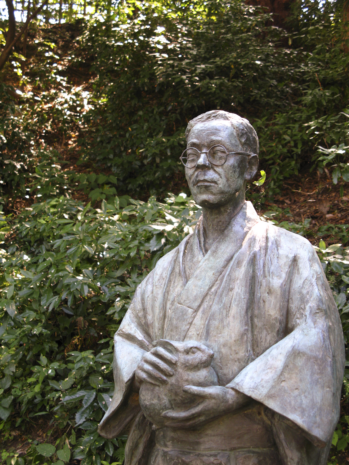 Statue of Kyoka Izumi, Kanazawa, Ishikawa Prefecture, Japan On Hakucho-ro, a walking path